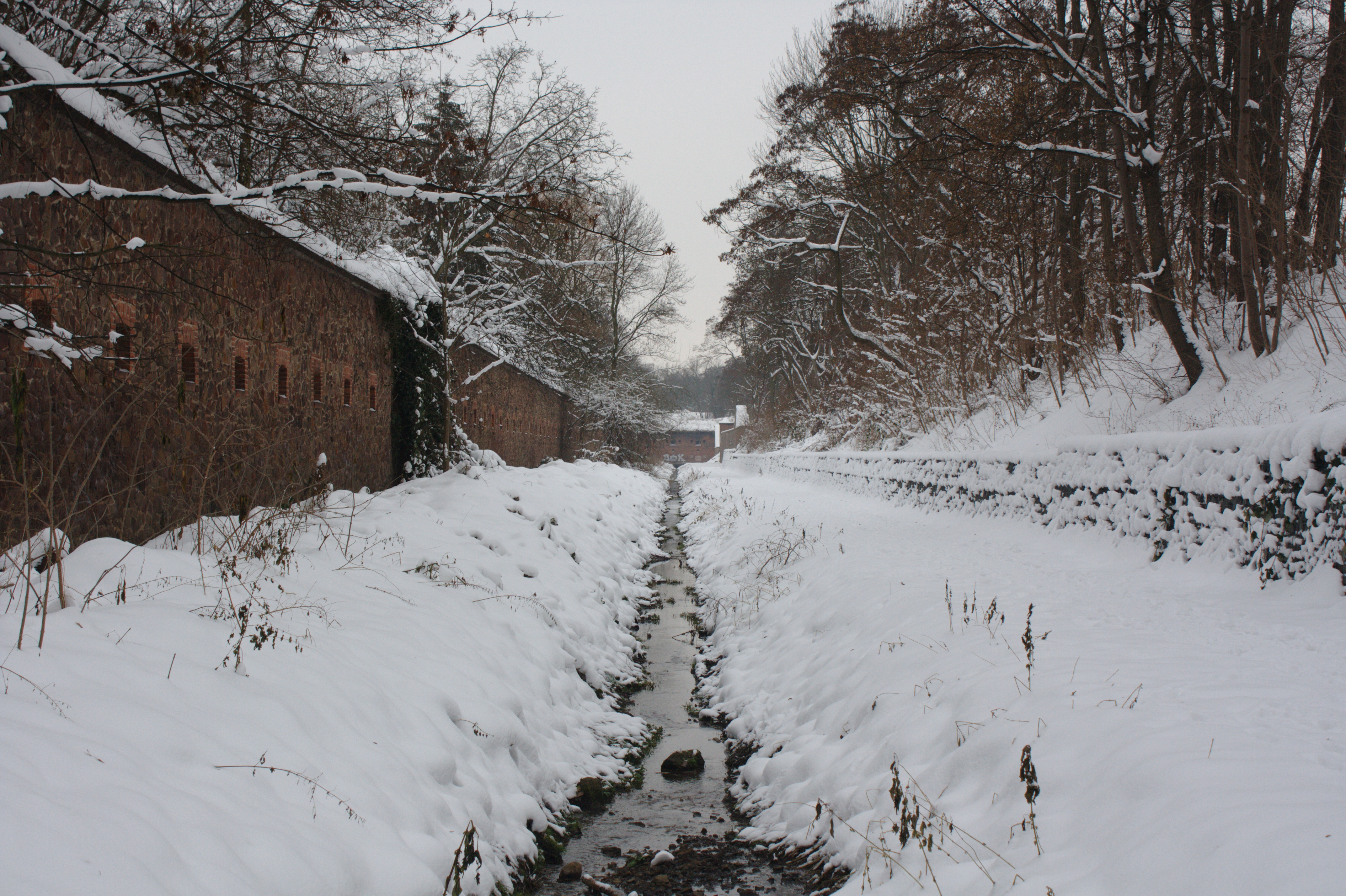 Künette in Magdeburg zwischen Hauptbahnhof und Ring